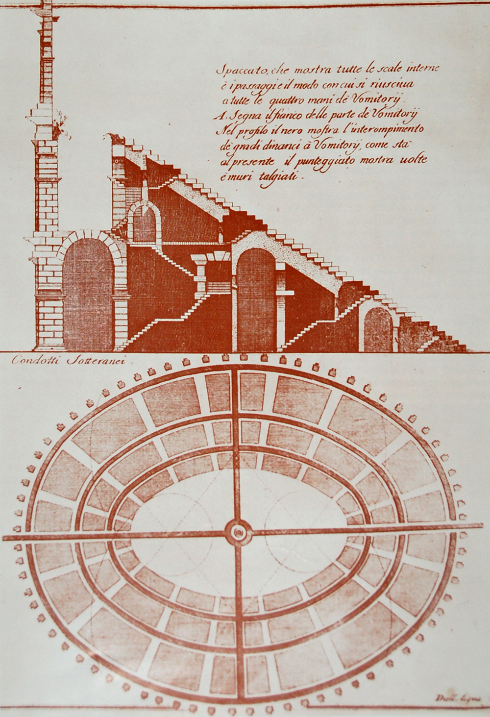 Spaccato dell'Arena di Verona in un'incisione di Scipione Maffei.